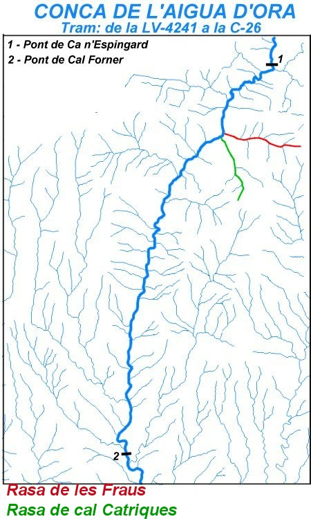 Mapa de la conca de l'Aigua d'Ora en el tram comprès entre la LV-4241 (pont de Ca n'Espingard) i la C-26 (pont de Cal Forner) en el qual s'hi han destacat la Rasa de les Fraus i la Rasa de cal Catriques